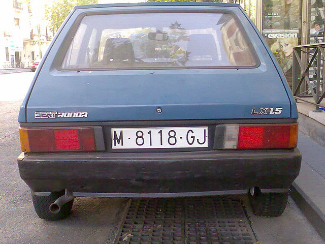 1986 SEAT Ronda. Camera: Nokia 6288 License on Flickr (2011-02-14): CC-BY-2.0 Flickr tags: SEAT, Madrileño, FIAT STRADA, flickr, jacoibo5731